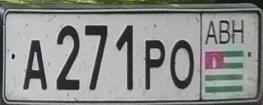 Абхазский автомобильный номер